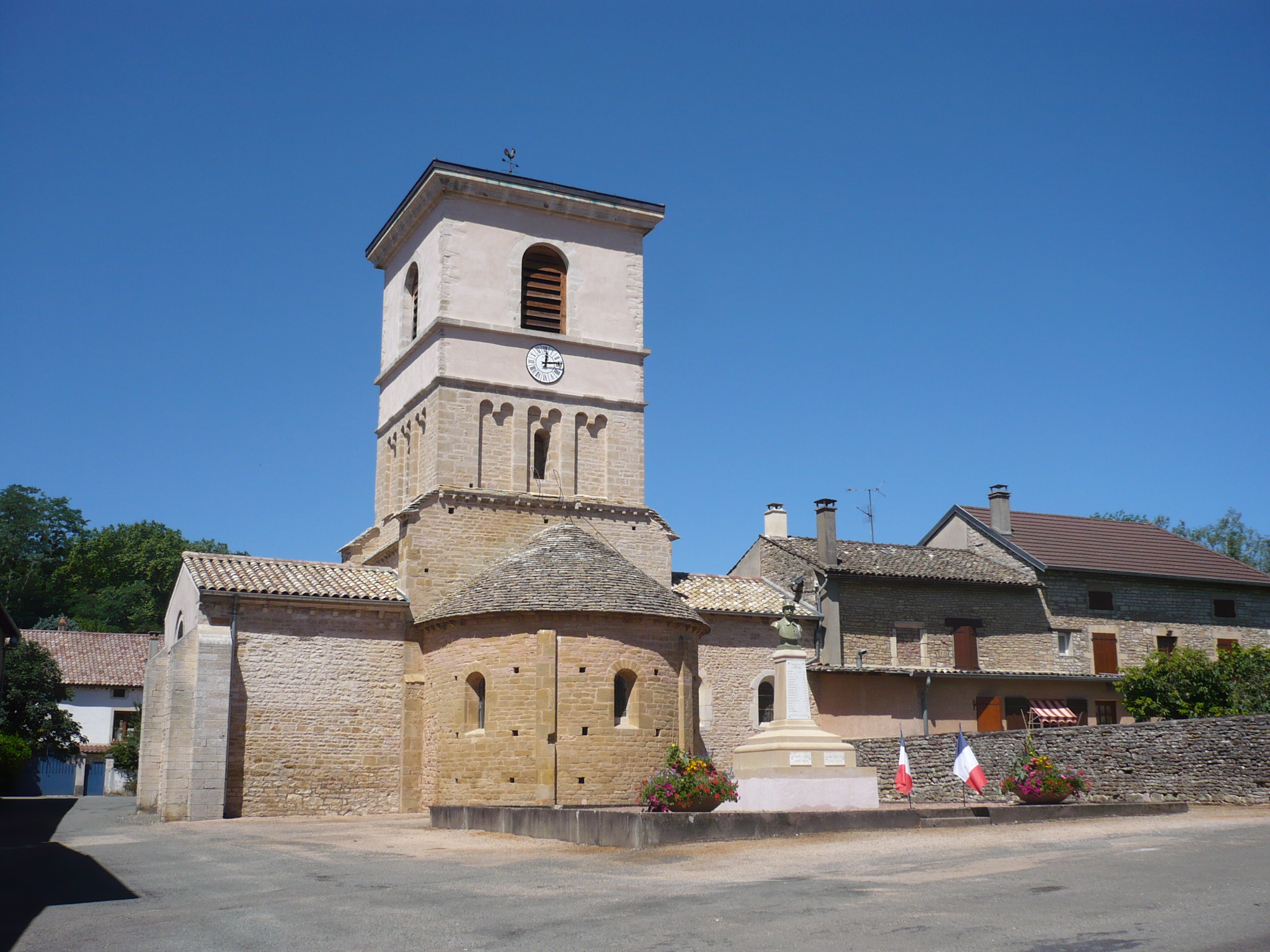 Chardonnay